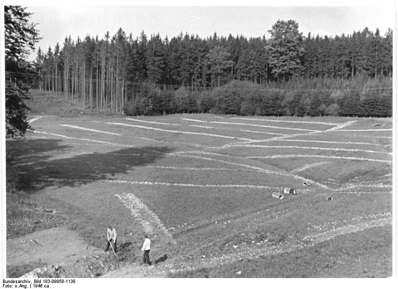 Gross-Hermersdorf, Meliorationsarbeiten Drainagearbeiten auf dem Volksgut Thomas Münzer. Nasse Wiesen werden in Ackerboden verwandelt. Volksgut Thomas Münzer in Gross-Hermersdorf, Sachsen. Leihweise Illus Berlin W8